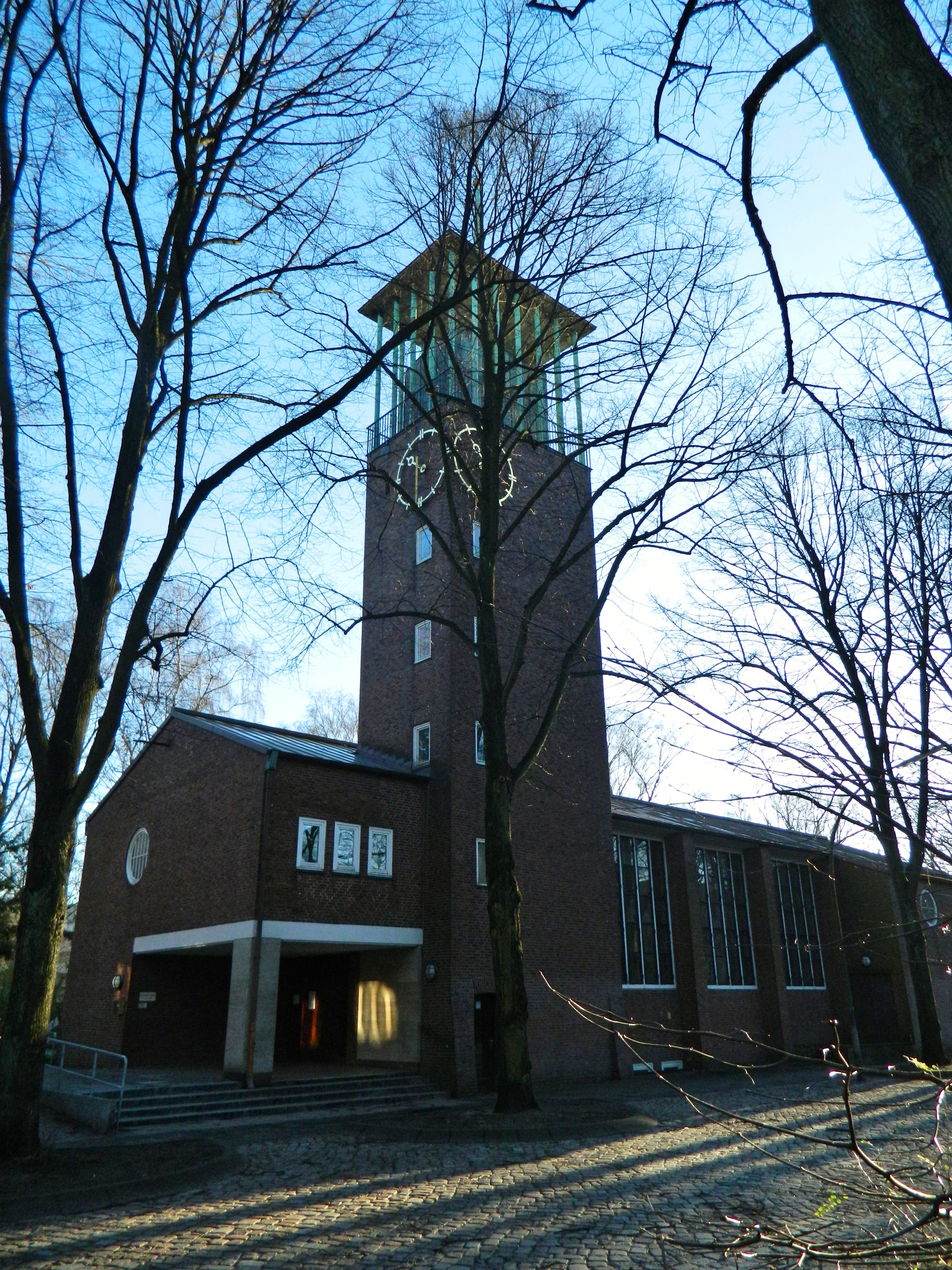 St.Gabriel